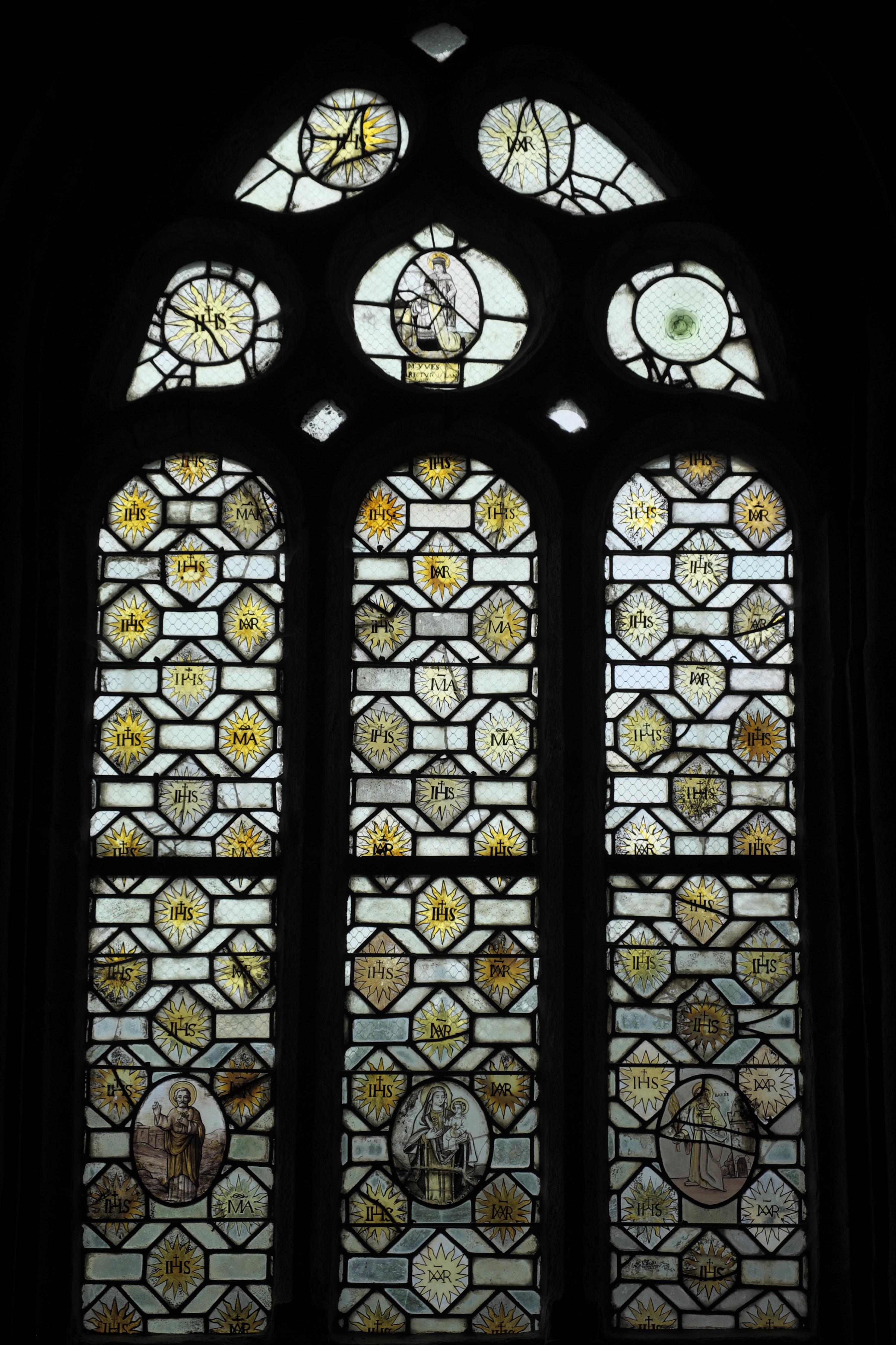 Katholische Kirche Saint-Edern in Lannédern im Département Finistère (Region Bretagne/Frankreich), Bleiglasfenster (baie 6) von 1750/52 mit Fragmenten aus dem 16. Jahrhundert; Grisaille und Silberlot; Darstellung: Christus- und Marienmonogramm, in den ovalen Medaillons: Apostel Petrus (links), Madonna mit Kind (Mitte), heilige Barbara (rechts)